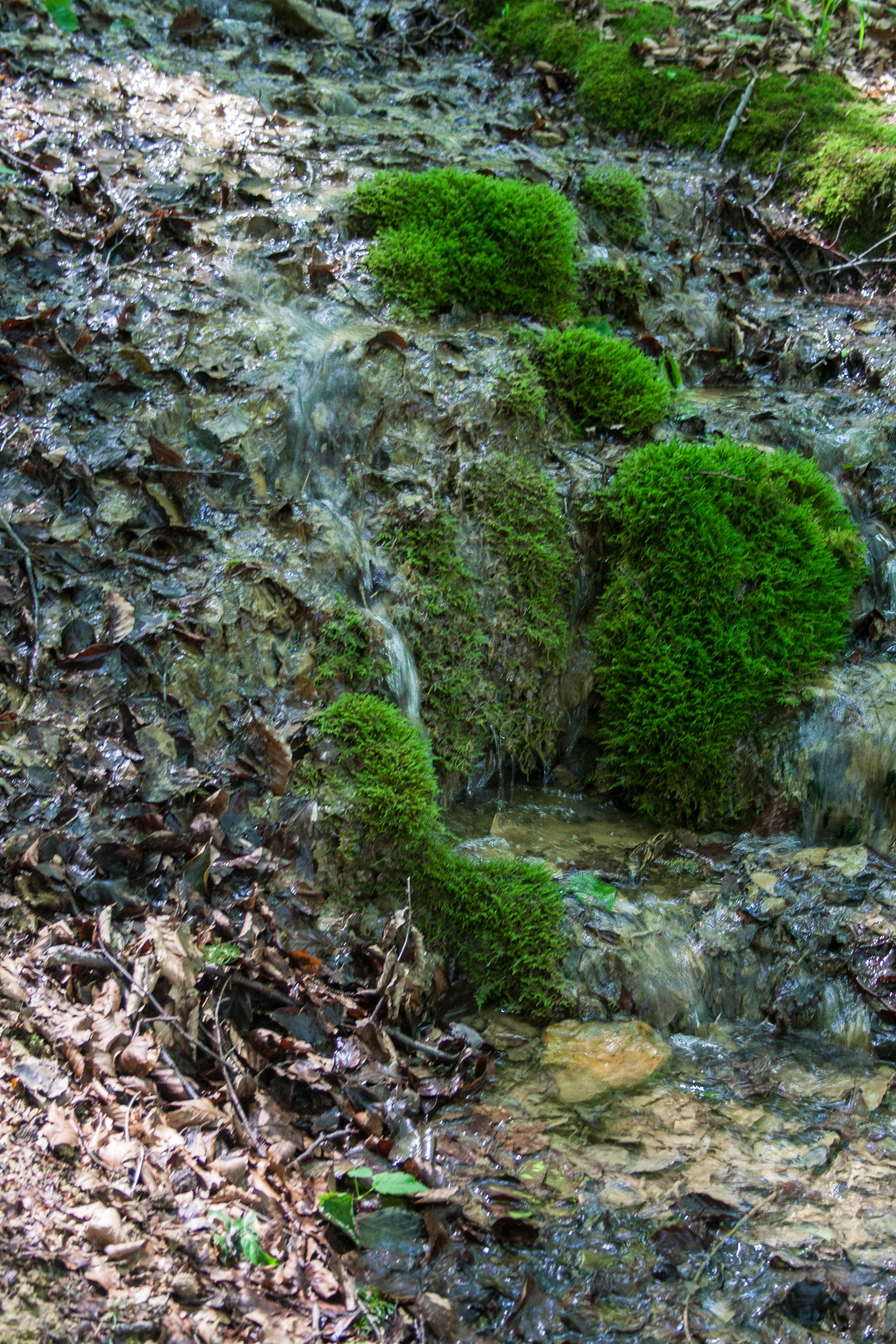 Steinerne Rinne, Buchenberg, Engelthal, Entenberg, Ausweisung des LSG "Südlicher Jura mit Moritzberg und Umgebung"